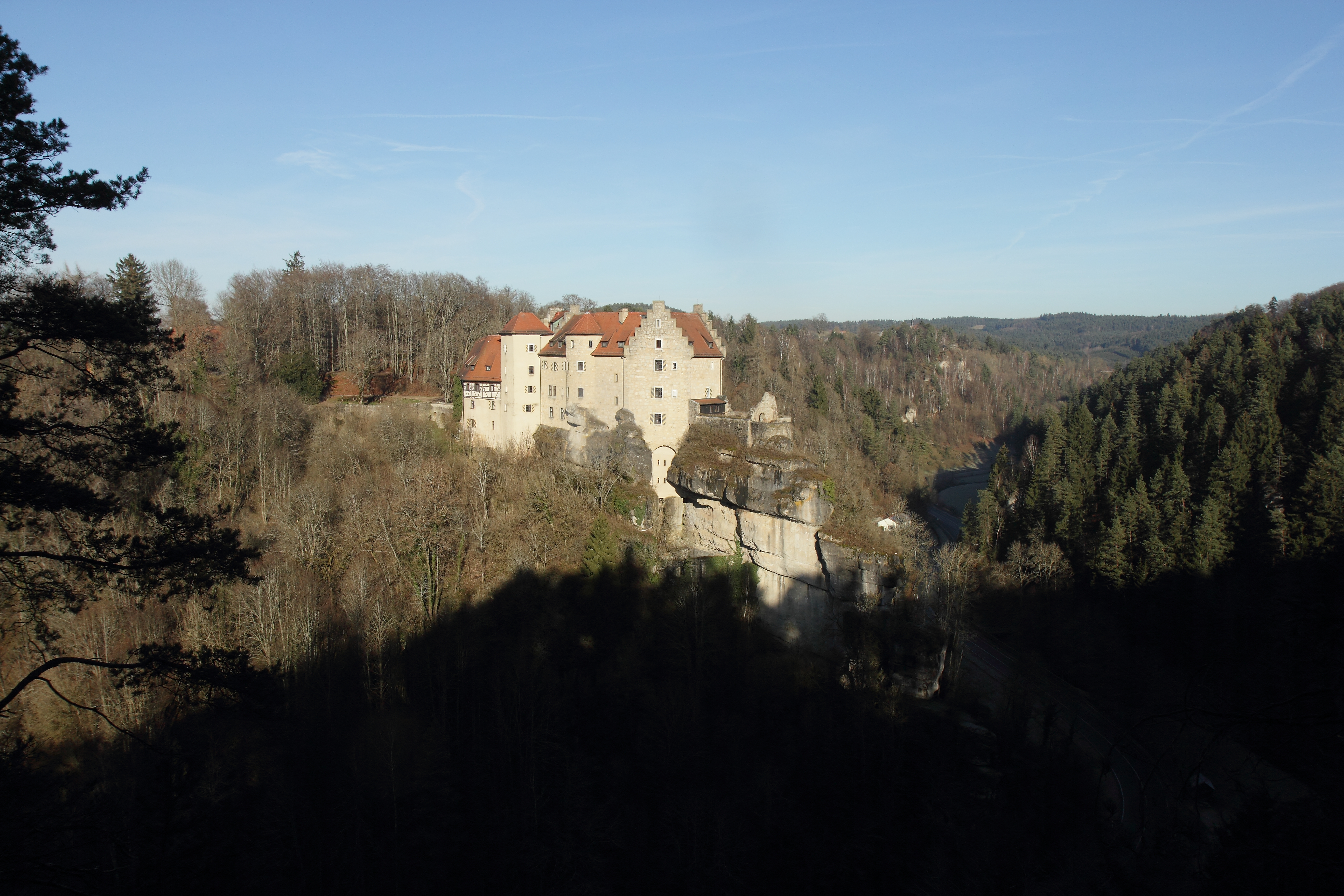 Burg Rabenstein - Ansicht aus südlicher Richtung